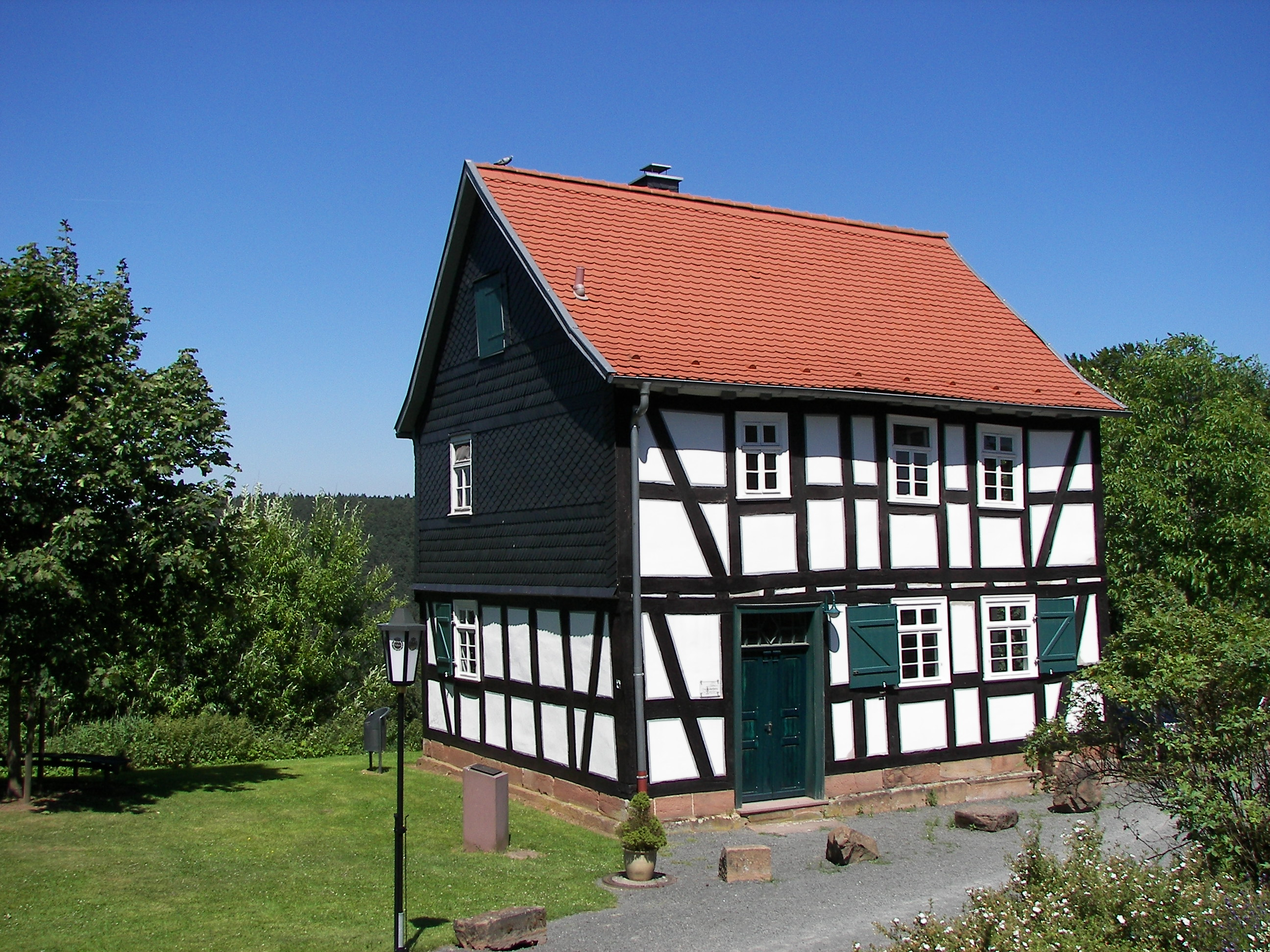 Christenberg, altes Küsterhaus, heute Museum